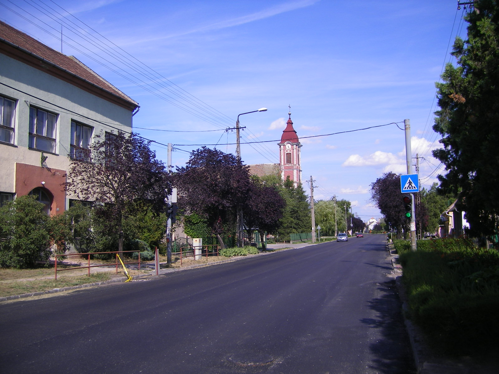 Dél-Komárom/Szőny - Széchenyi István utca (1-es főút). Mária mennybevitele Római katolikus templom műemlék ID 6310. Szabadon álló, egyhajós, egyenes szentélyzáródású templom, D-i homlokzata előtt toronnyal, a szentély felett kontyolt nyeregtetővel, a szentély K-i és Ny-i oldalához csatlakozó mellékterekkel, a sekrestyével és kápolnával. Csehsüveg boltozatú hajó és szentély, a hajó bejárati oldalán karzat. A belső térben pilasztereken, a nyílások fölött füzérdíszes stukkódíszítés. Falképek: 1973 (Nemcsics Antal). Berendezés: 18. század második fele. Orgona: 1781 (Johann Ignaz Zeisky), átépítve. Építtette gróf Zichy Miklósné, Berényi Erzsébet grófnő 1777-ben (építész: Fellner Jakab). 1891-ben, 1958-ban és 1971-ben felújították.